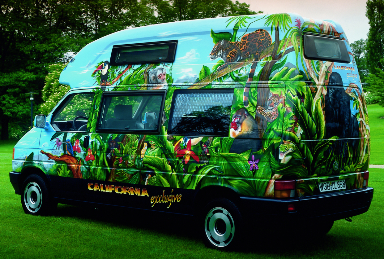 VW-California